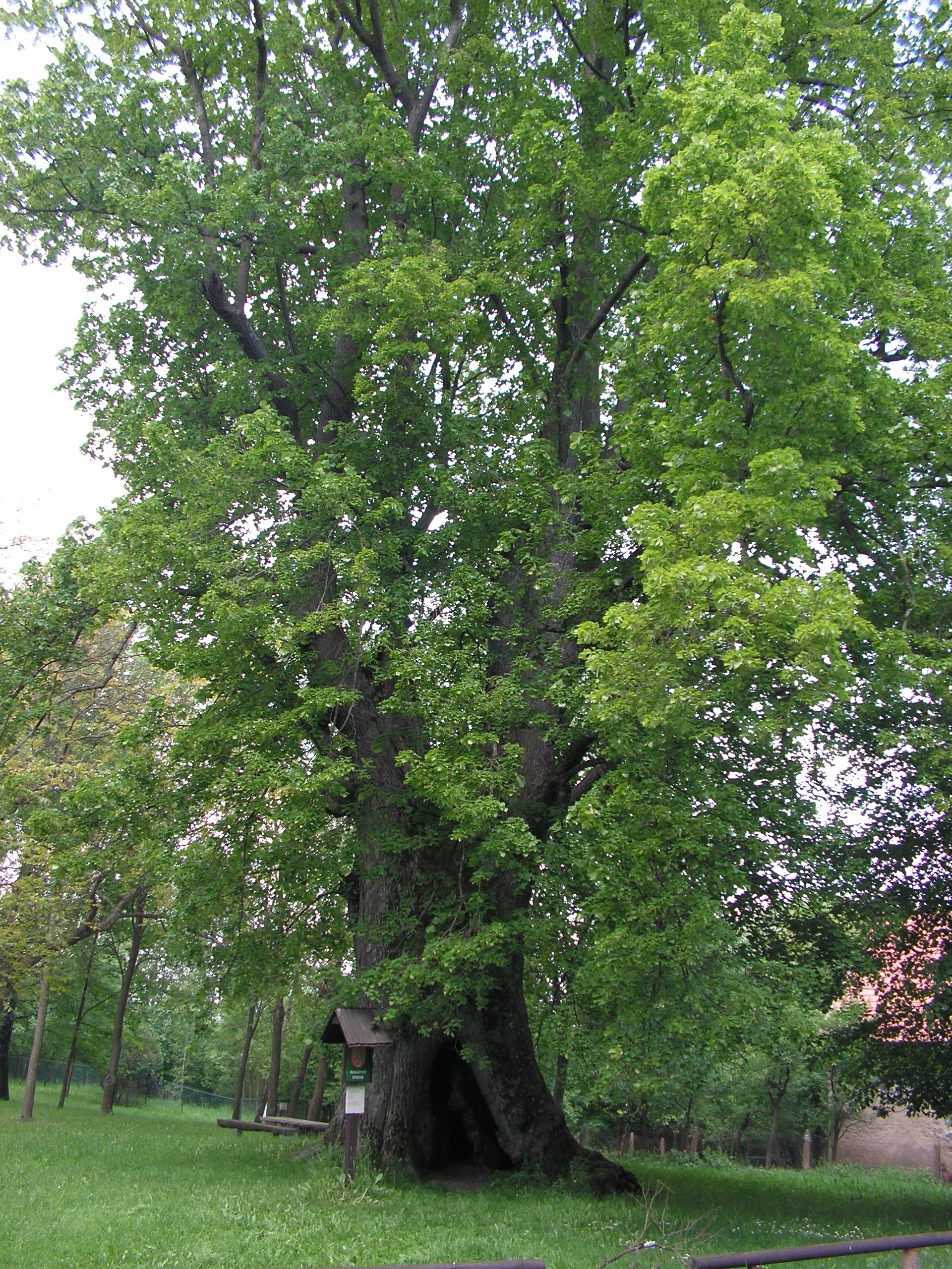 Štikovská lípa v okrese Havlíčkův Brod